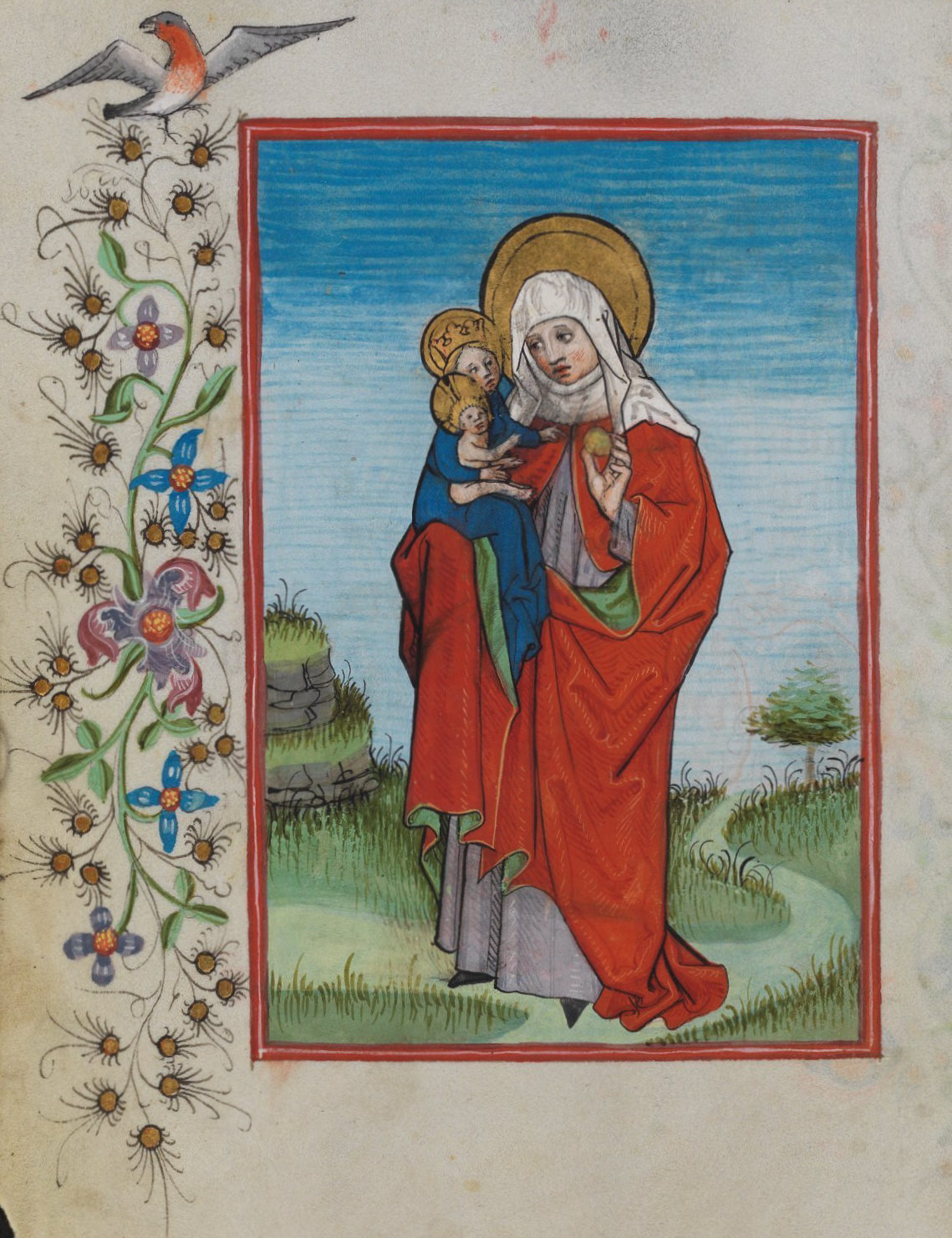 Anna selbdritt, illuminierte Seite aus dem Waldburg-Gebetbuch, WLB Stuttgart, Cod. brev. 12, fol. 51v